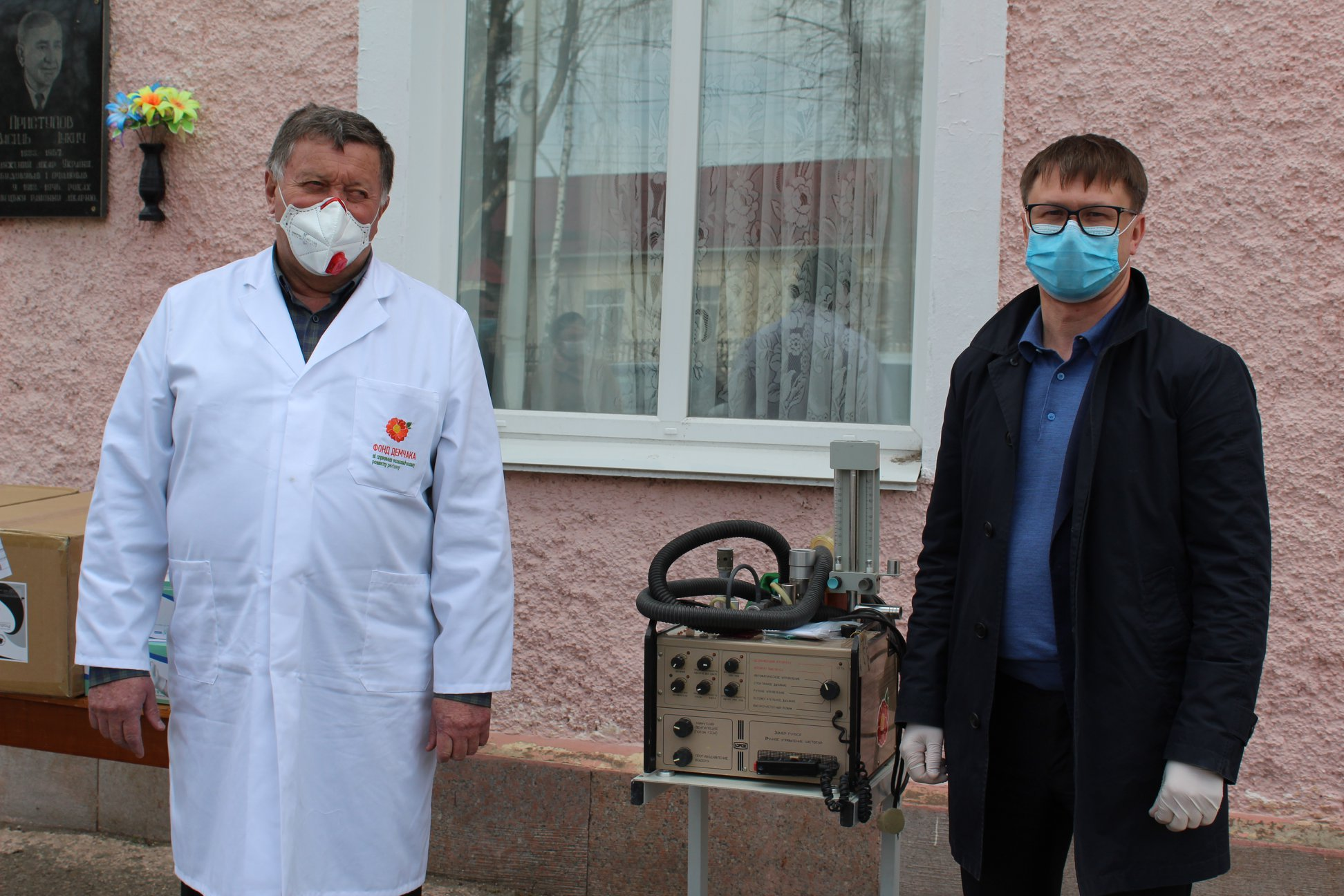 Благодійна допомога медпрацівникам Липовецького району від Руслана Демчака